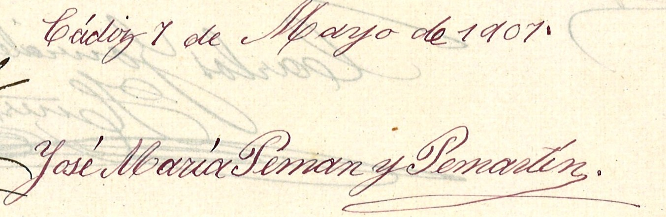 Firma de José María Pemán